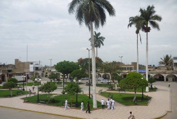 Guadalupe